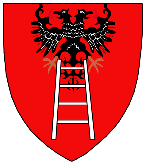 Stemma della casata degli Scaligeri, versione con l'aquila impariale